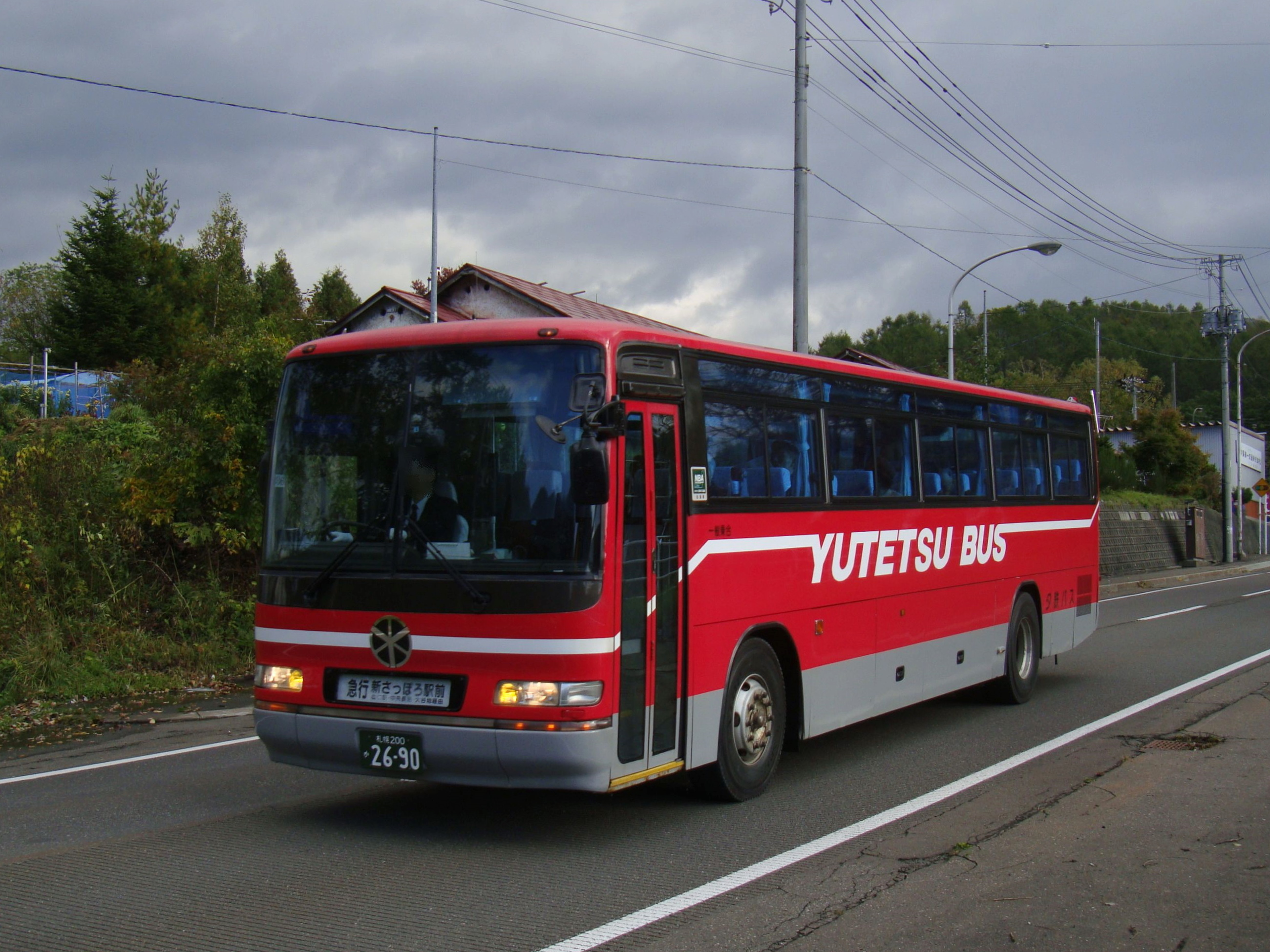 Yūbari to Sapporo